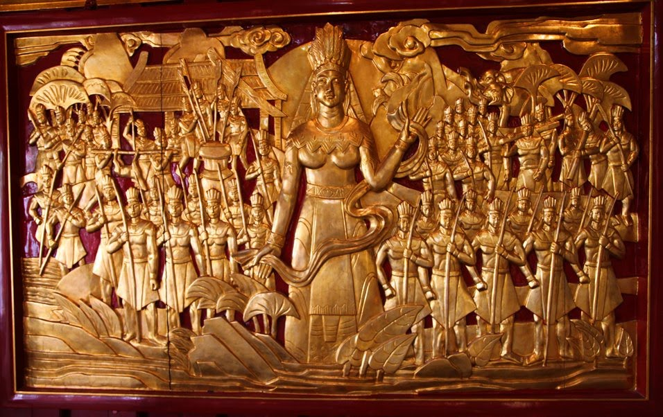 Phù điêu Âu Cơ